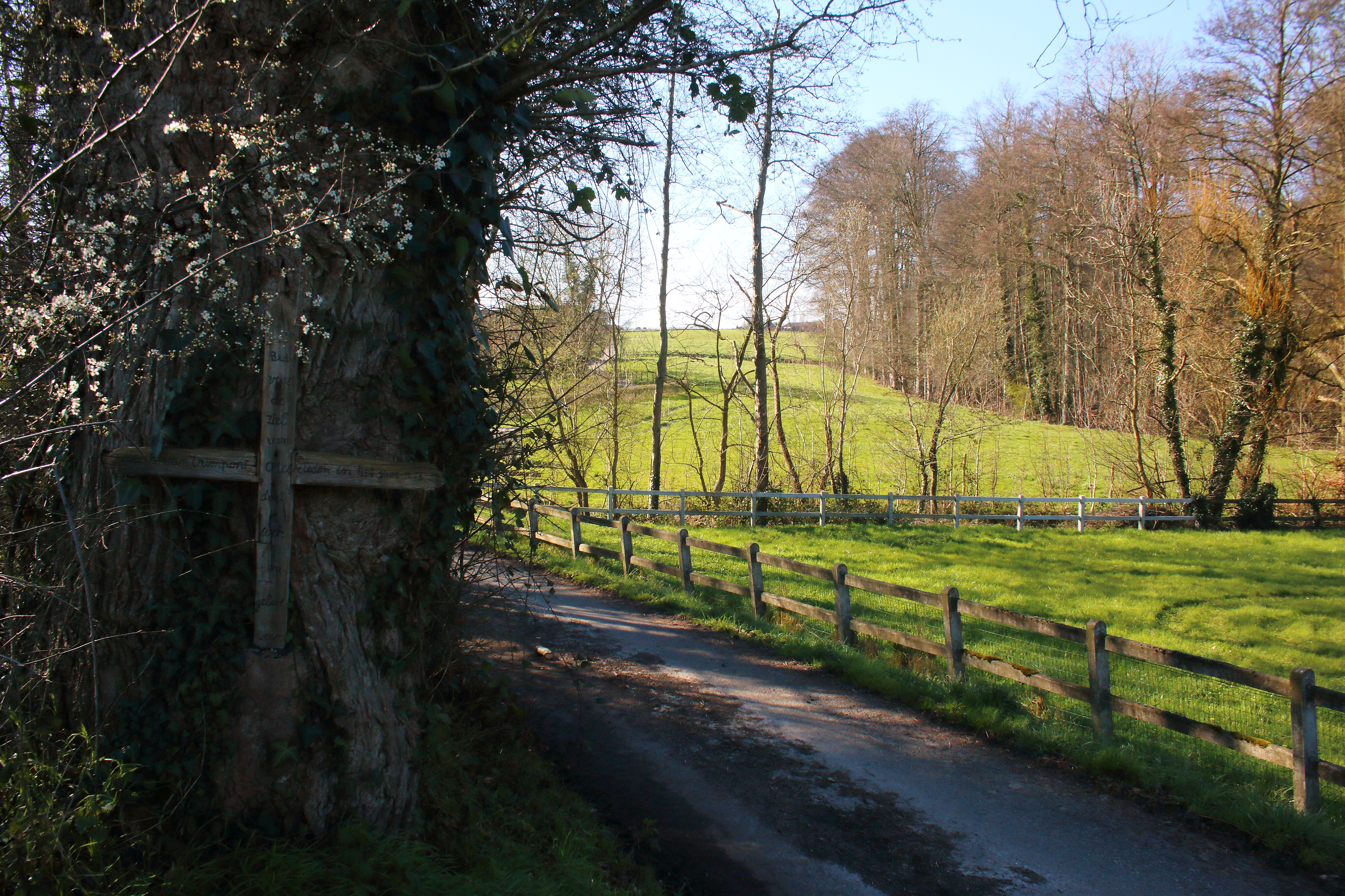 Trimpont, Everbeek, Brakel, Vlaanderen, België